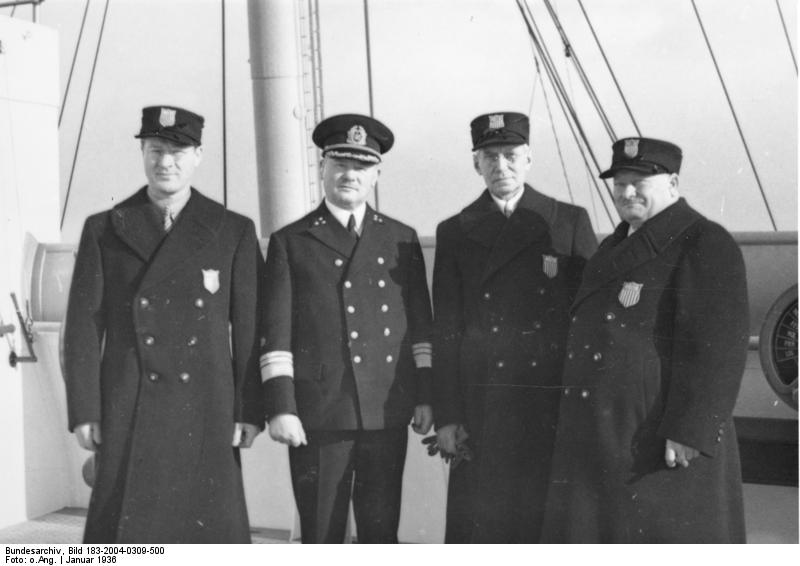 Bremen, Avery Brundage eingetroffen Scherl: Der Präsident des amerikanischen Olympia-Komitees in Deutschland eingetroffen. Mit dem Schnelldampfer "Bremen" des Norddeutschen Lloyd sind soeben der Präsident des amerikanischen Olympia-Komitees, Avery Brundage, sowie der Schatzmeister des Komitees Gustav Kirby und das Vorstandsmitglied Dietrich Wortmann zu den olympischen Spielen in Deutschland eingetroffen. Die Gäste wurden vom Senat der Hansestadt Bremen feierlich empfangen und mit einem Ehrentrunk begrüßt. V.l.n.r.: Avery Brundage, Kommodore Ziegenbein, der Führer der "Bremen", Gustav Kirby, und Dietrich Wortmann. 1416-36 [Vorbereitung der Olympischen Winterspiele in Garmisch-Partenkirchen] Abgebildete Personen: Brundage, Avery: Präsident des Internationalen Olympischen Komitees (IOC), USA (GND 118516078) Kirby, Gustav: Schatzmeister des Olympischen Komitees, USA Ziegenbein, Leopold: Kapitän des Schnelldampfers Bremen, Kommodore, Deutschland Information added by Wikimedia users.:w:de:Leopold Ziegenbein (GND 124981992) Avery Brundage (left) with Leopold Ziegenbein, Captain of the S.S. Bremen (second to left), US Olympic official Gustavus Kirby, and Dietrich Wortmann. Aboard the Bremen, January 1936; the ship carried the US Winter Olympic team across the Atlantic; the Games were held in Garmisch-Partenkirshen.